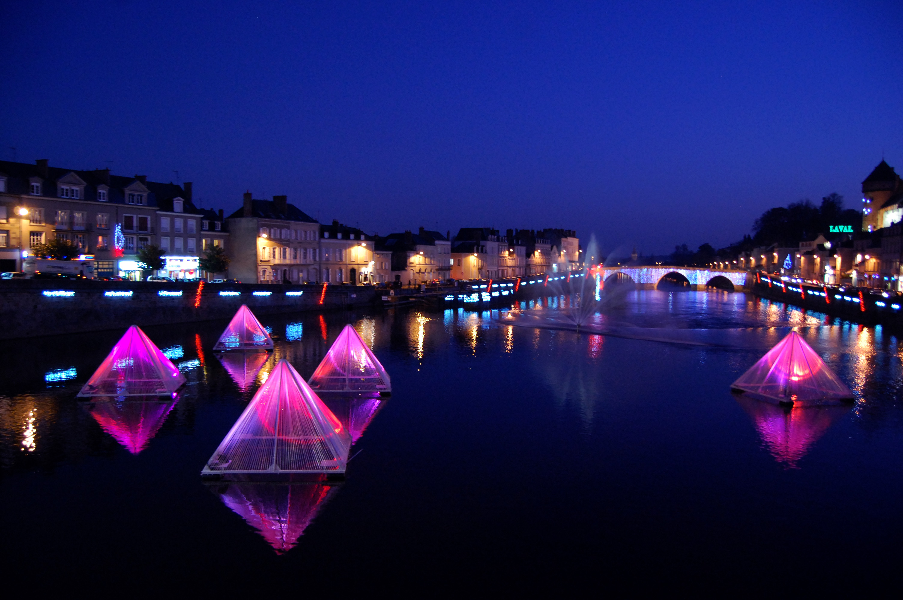 Explore Highest position #269 Laval, France